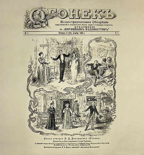 Обложка первого номера журнала «Огонек»